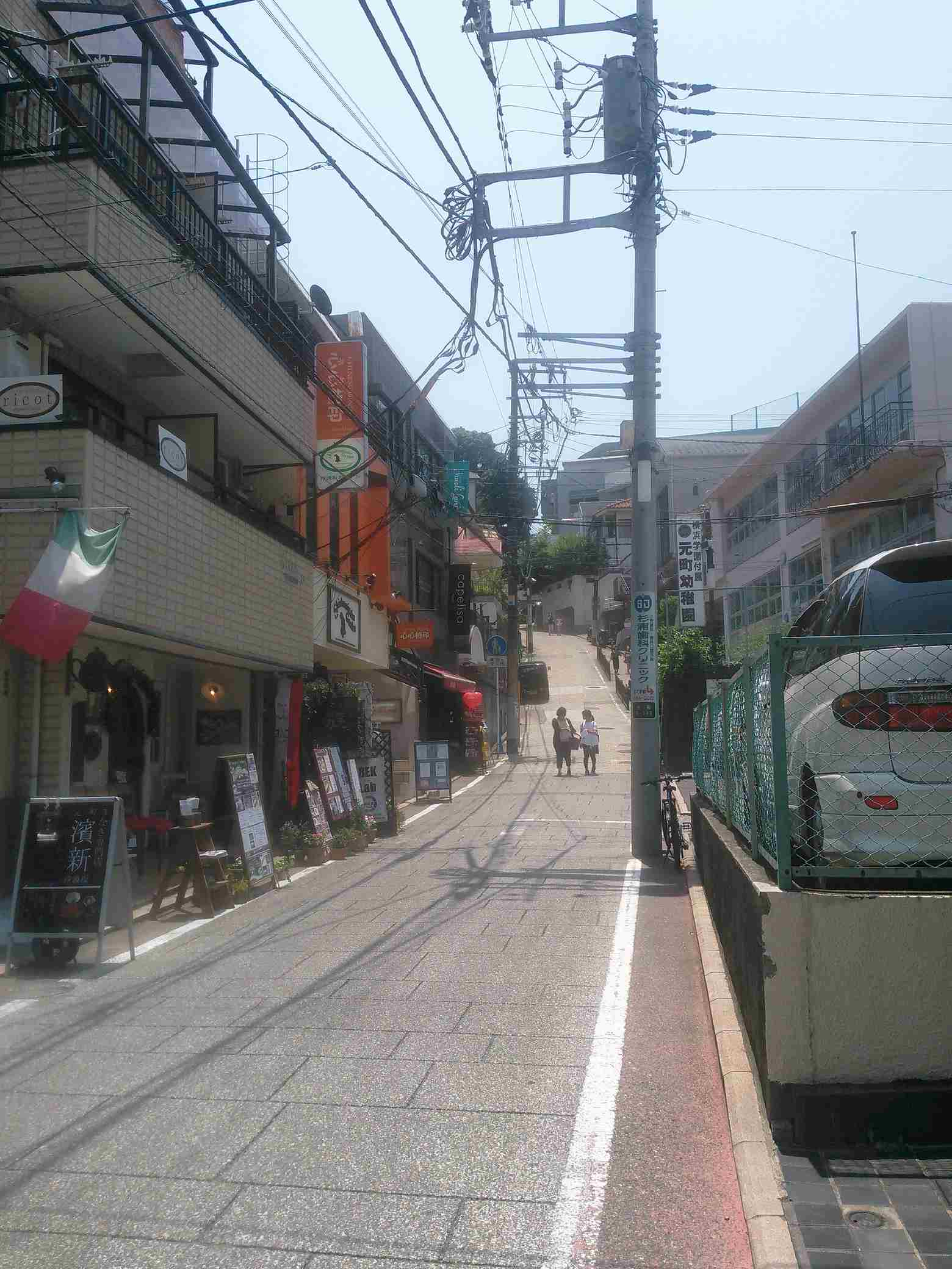 横浜元町、汐汲坂。坂の下は元町の商店街の一部をなす。